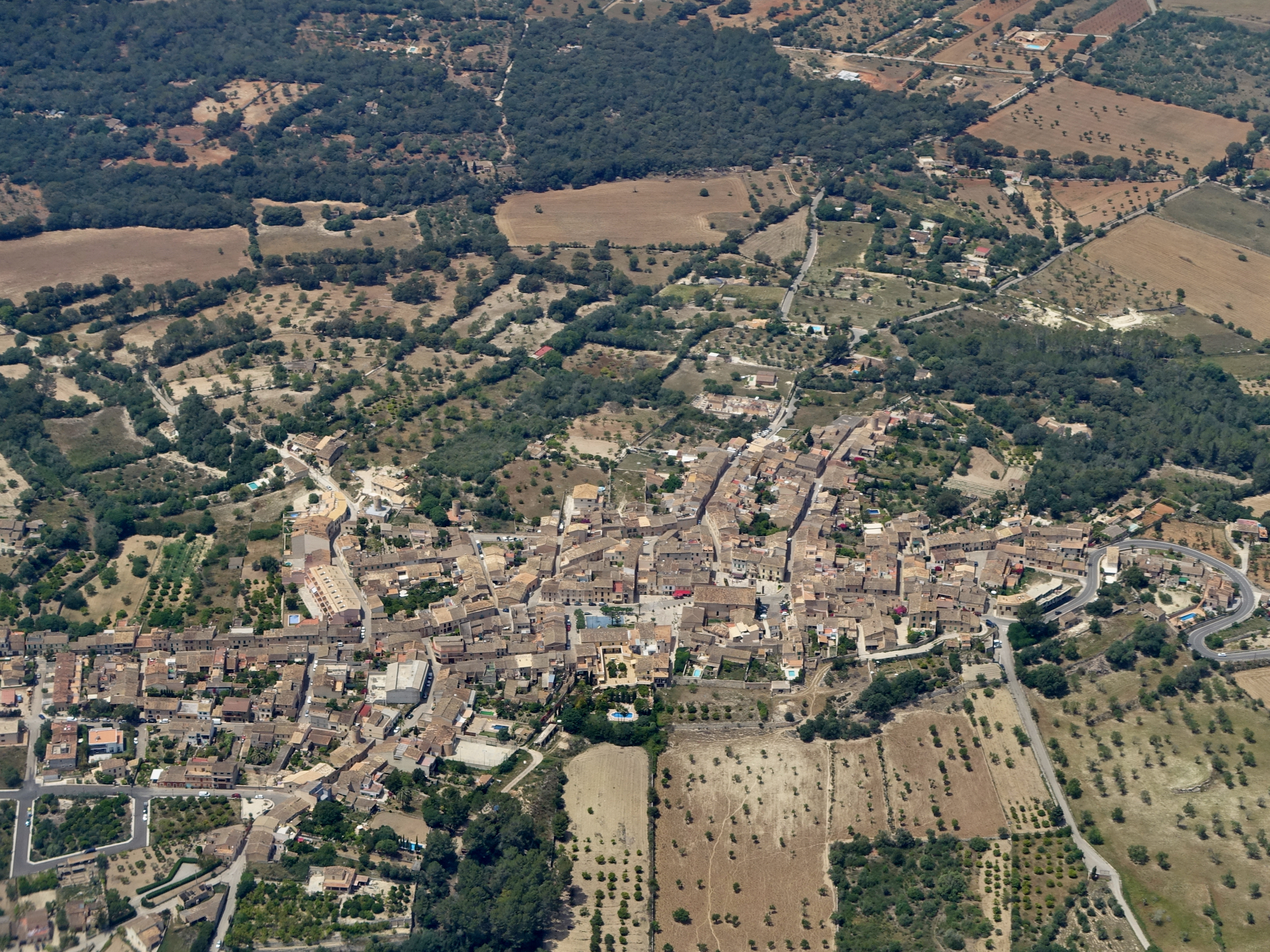 Blick auf Costitx, Mallorca, Spanien